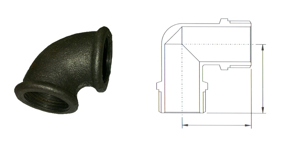 Трубопроводный отвод